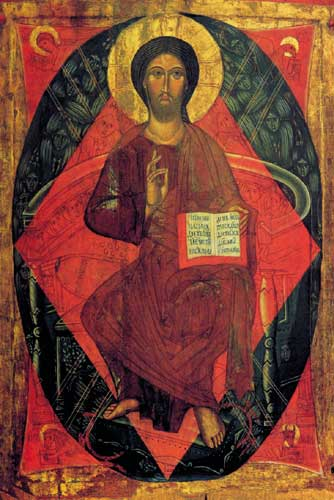 Спас у сілах. 2-я пал. XV ст., Галіччына